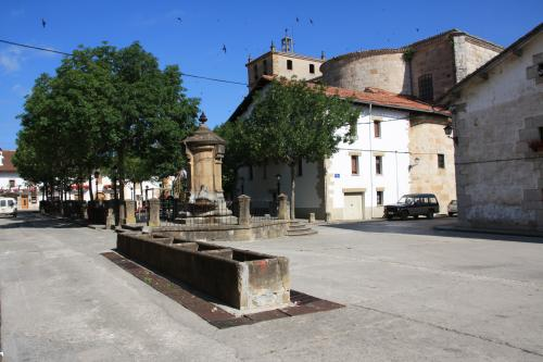 Uharte Arakilgo plazako iturria. Nafarroa, Euskal Herria.